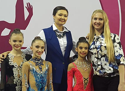 Команда Школы в Астане с Алией Юсуповой.16-18 апреля 2015 Международный турнир на приз Алии Юсуповой, Казахстан, Астана.